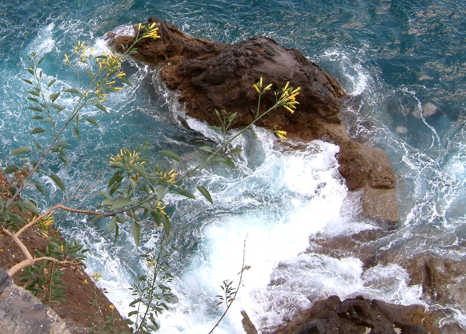 Madeira_funchal_nahe_bei_der_fähranlegestelle_5-7: Blaugrüner Tabak (Photographer: Peggy)